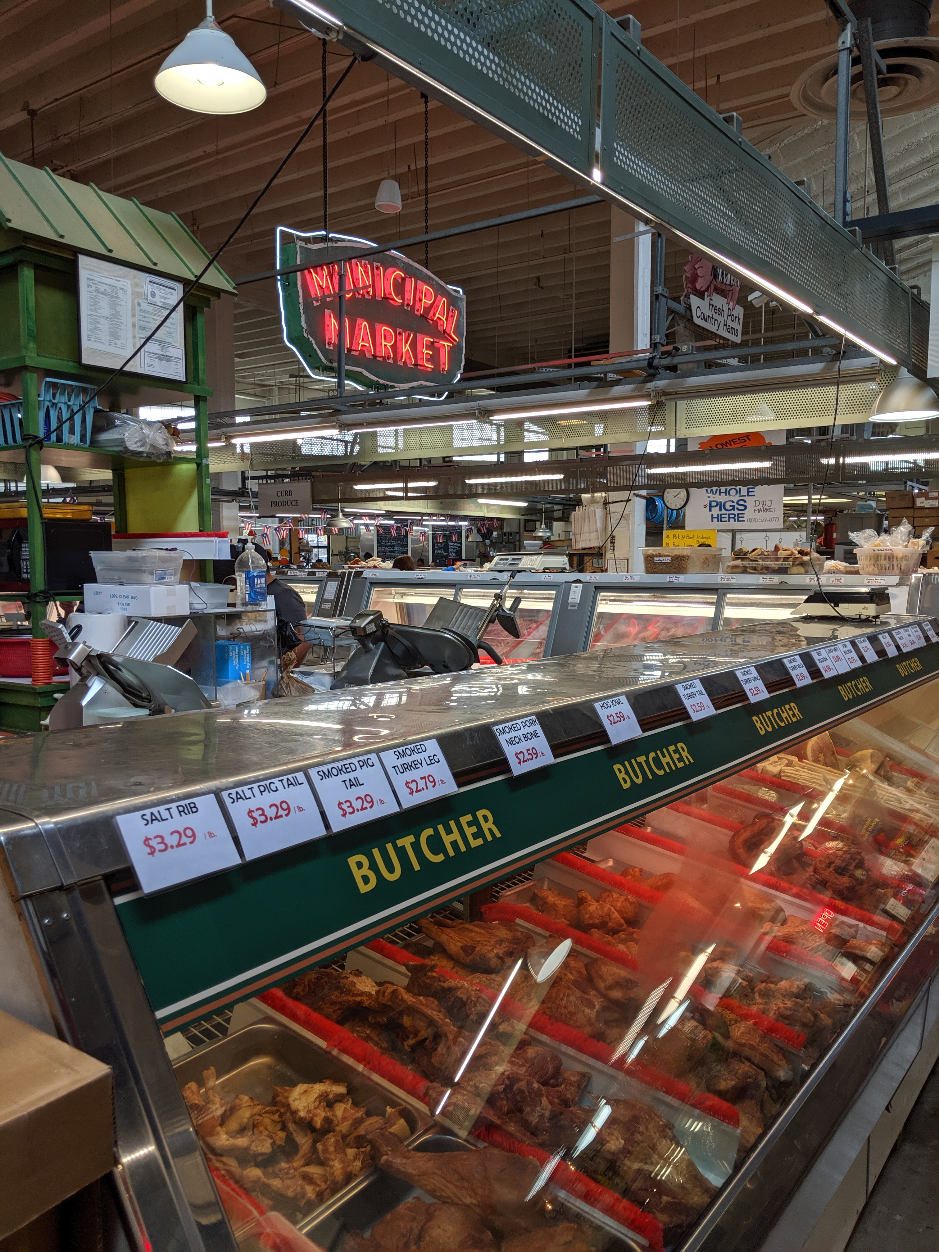 Sweet Auburn Market, Atlanta